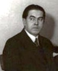 Harsányi Zsolt (Korompa, 1887. január 27. – Budapest, 1943. november 29.) író, újságíró, műfordító, színigazgató.